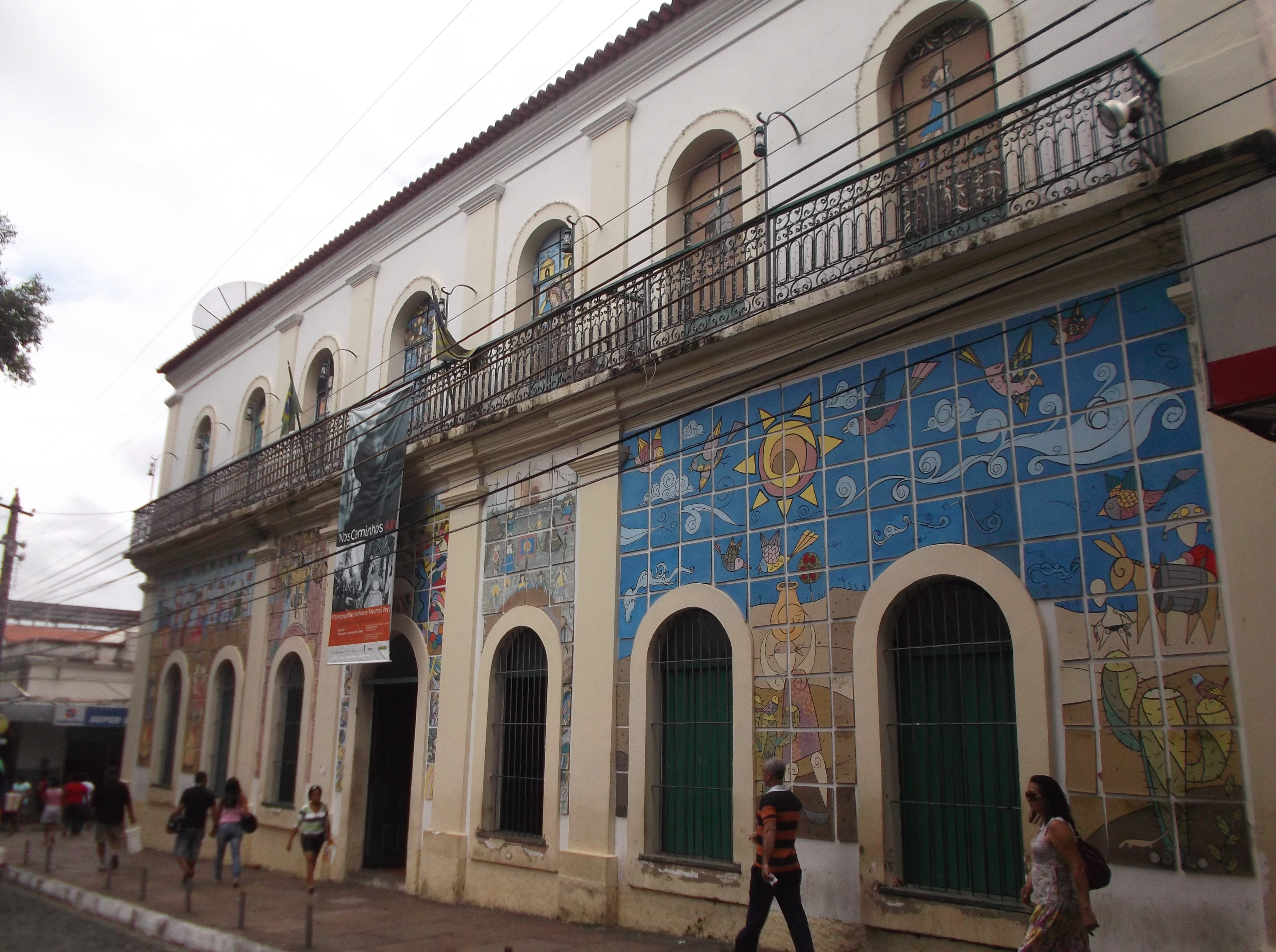 Palacete do Museu do Piauí em Teresina.